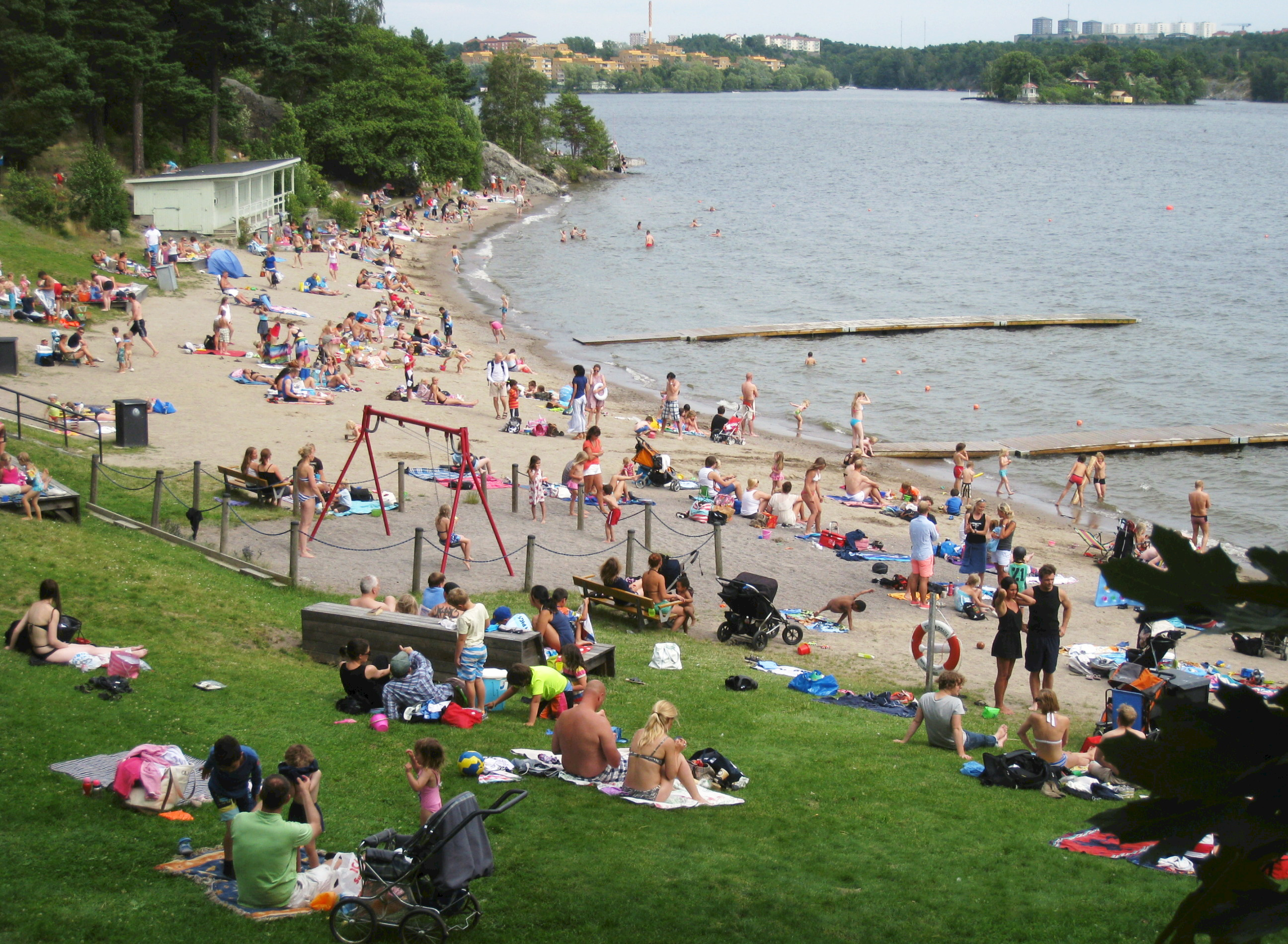 Gräsmatta, sandstrand och bryggor vid Solviksbadet, Smedslätten, Bromma.